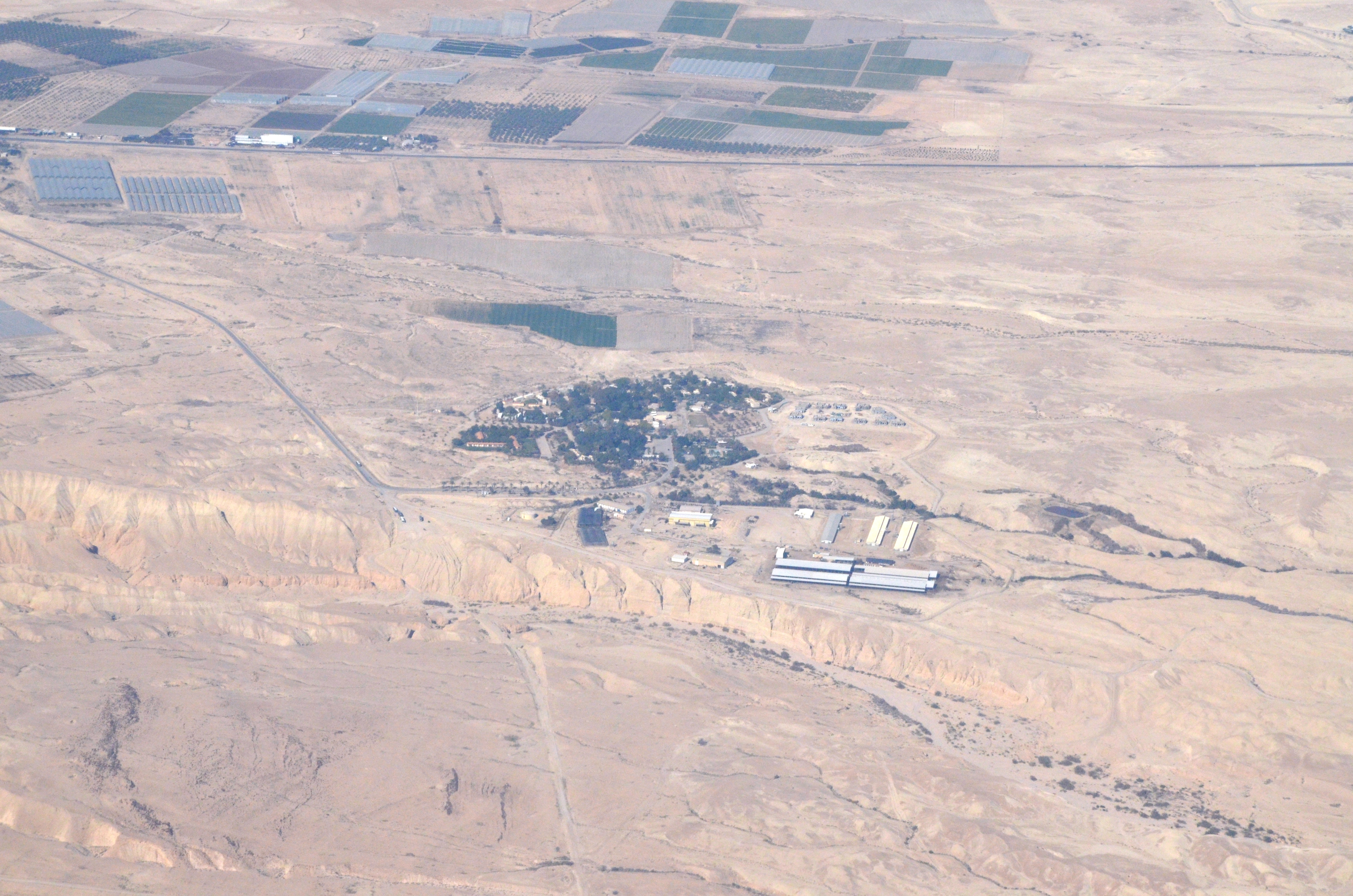 אלמוג